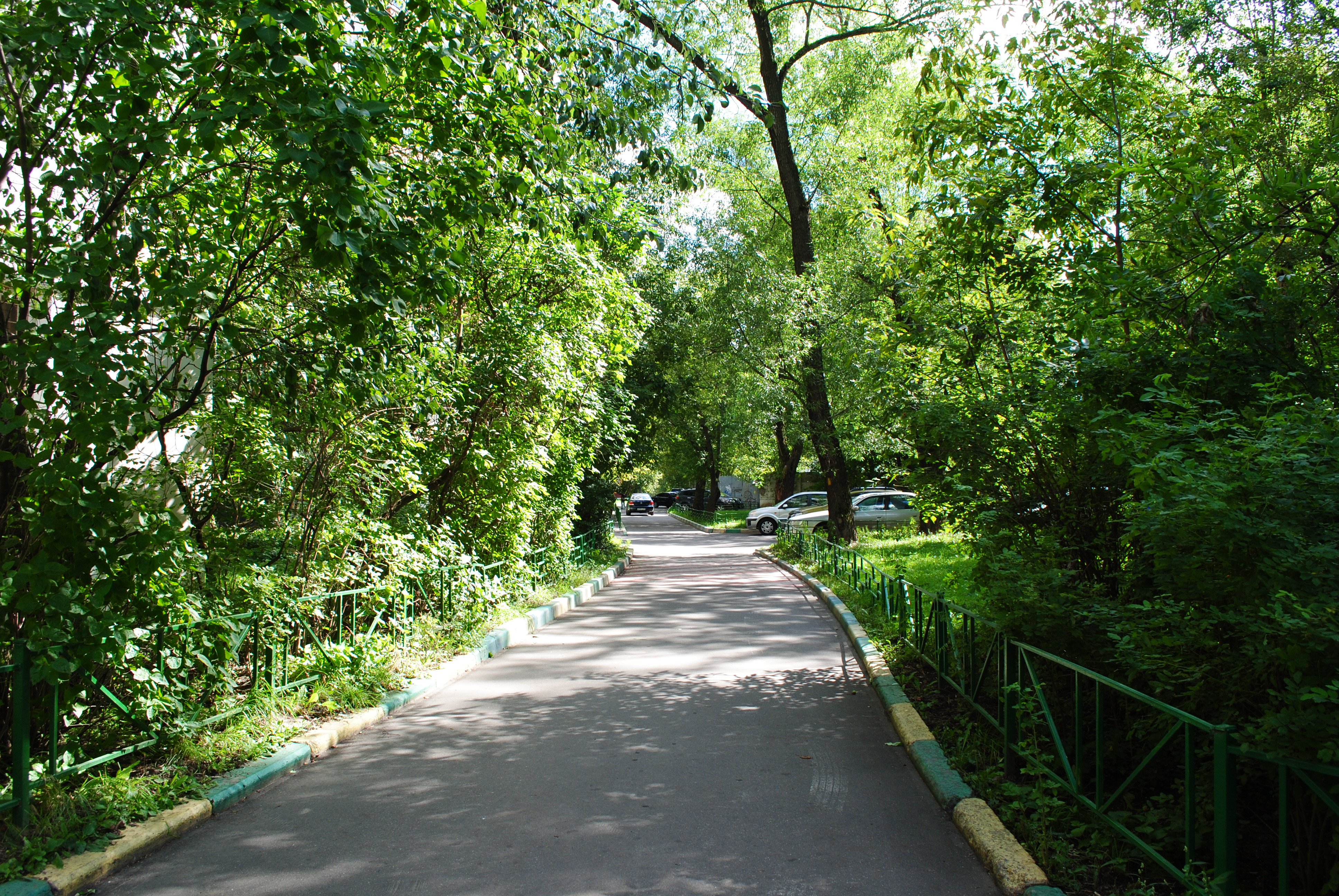 2-й Мосфильмовский переулок (вид от сквера в сторону Мосфильмовской улицы)